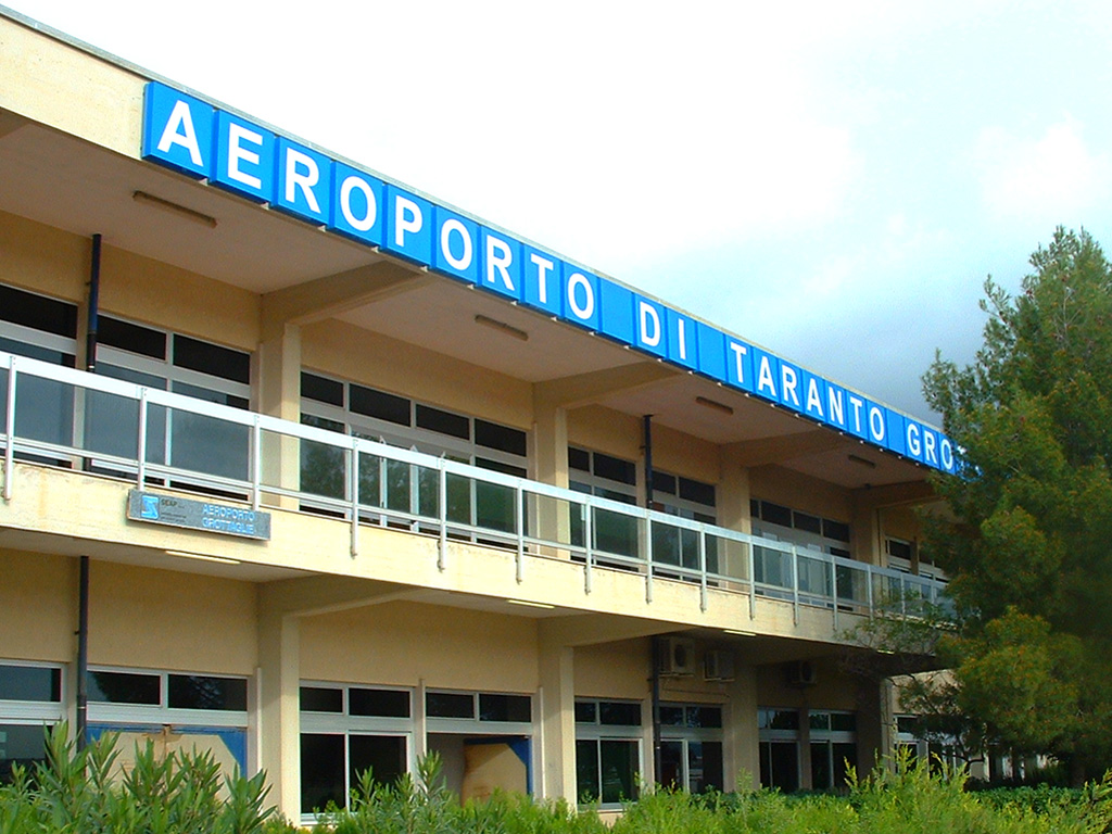 Veduta dall'esterno dell'Aeroporto di Taranto-Grottaglie